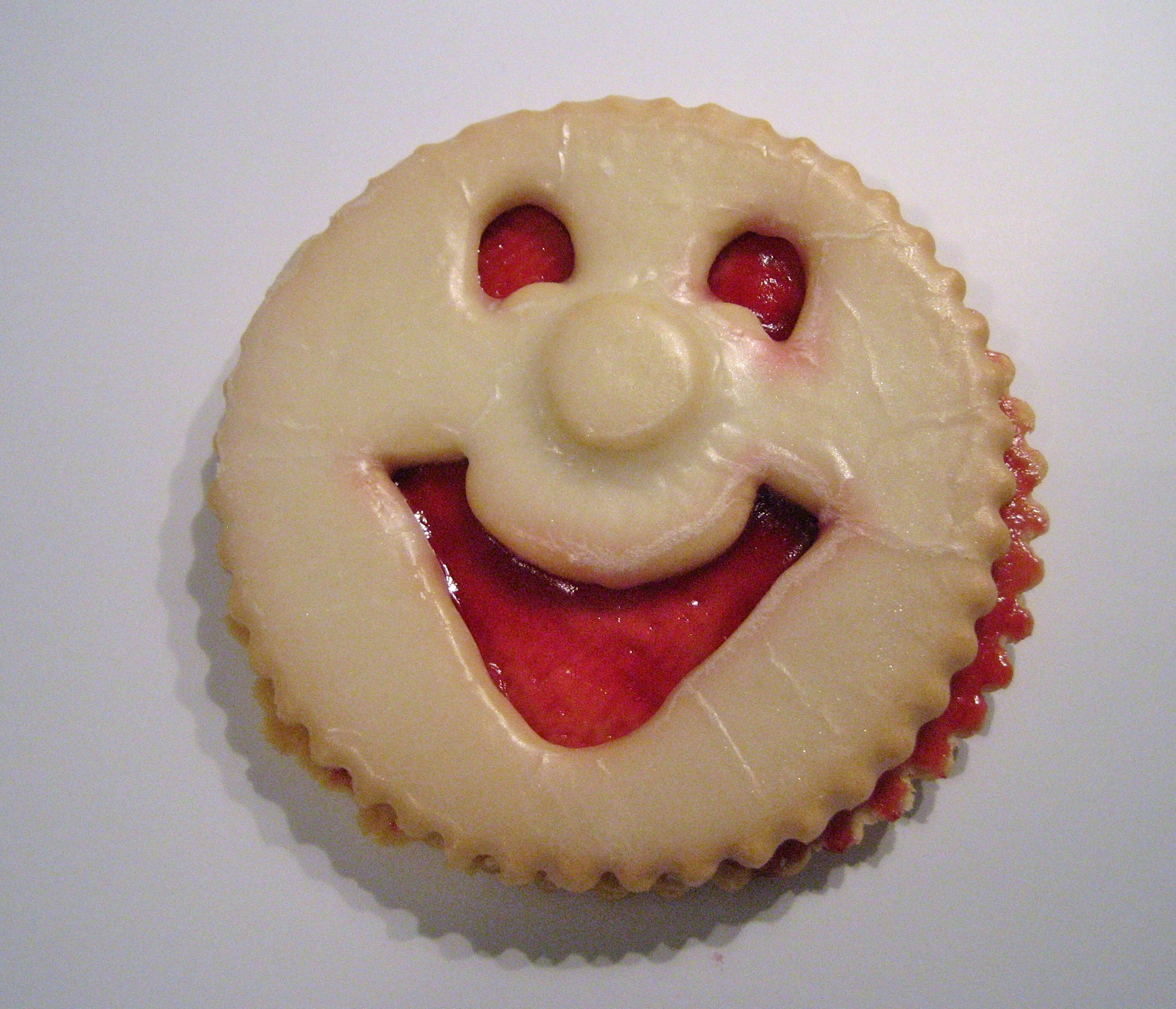 Linzer Auge (Spitzbub, Pfauenauge)